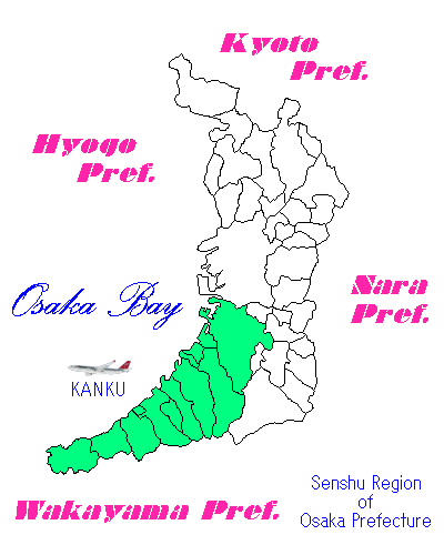 投稿者自身が投稿者自身の在住する『大阪・泉州』の位置を示すイラストを作成。 某メーカー製グラフィックソフトで作成したもの。